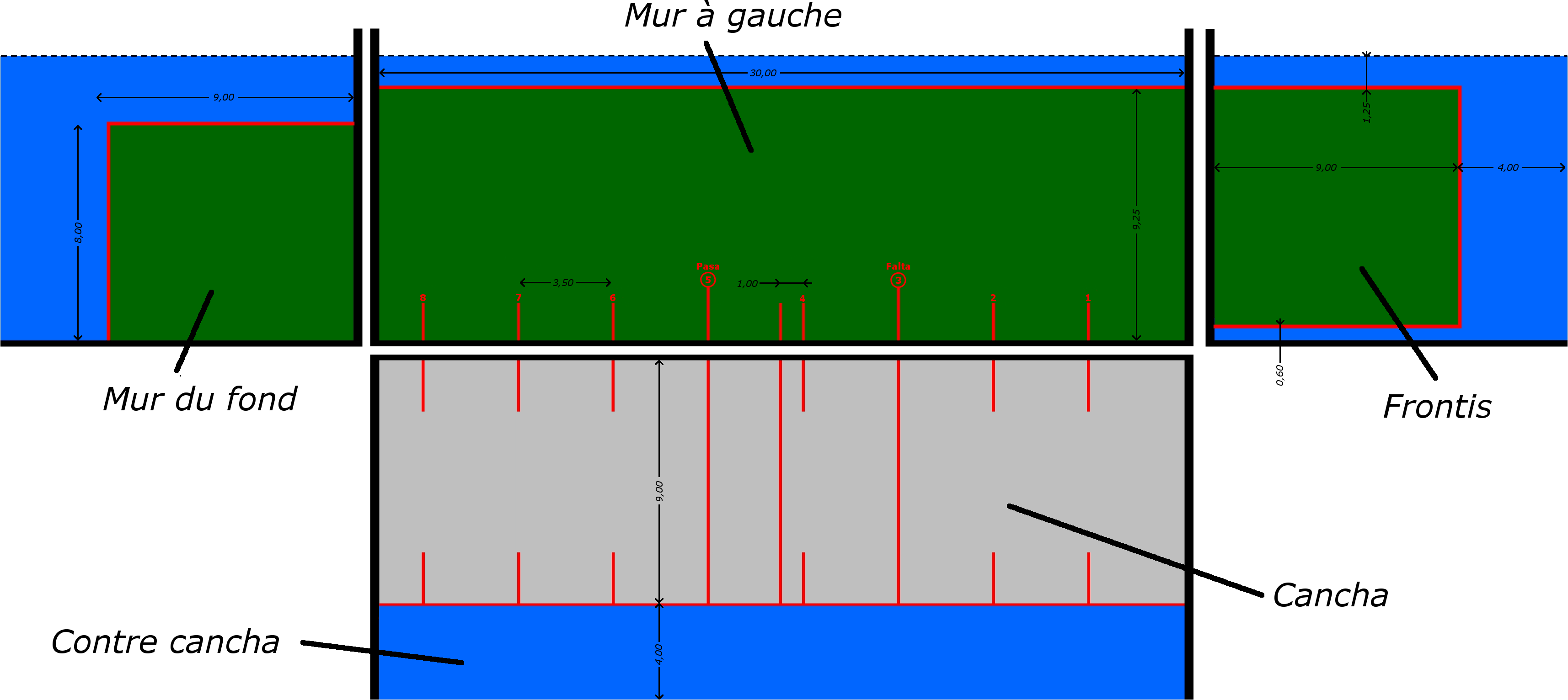 Plan FFPB